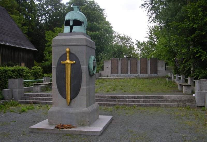 Gedenkstätte im Chemnitzer Stadtteil Grüna neben der Luther-Kirche an der Chemnitzer Straße